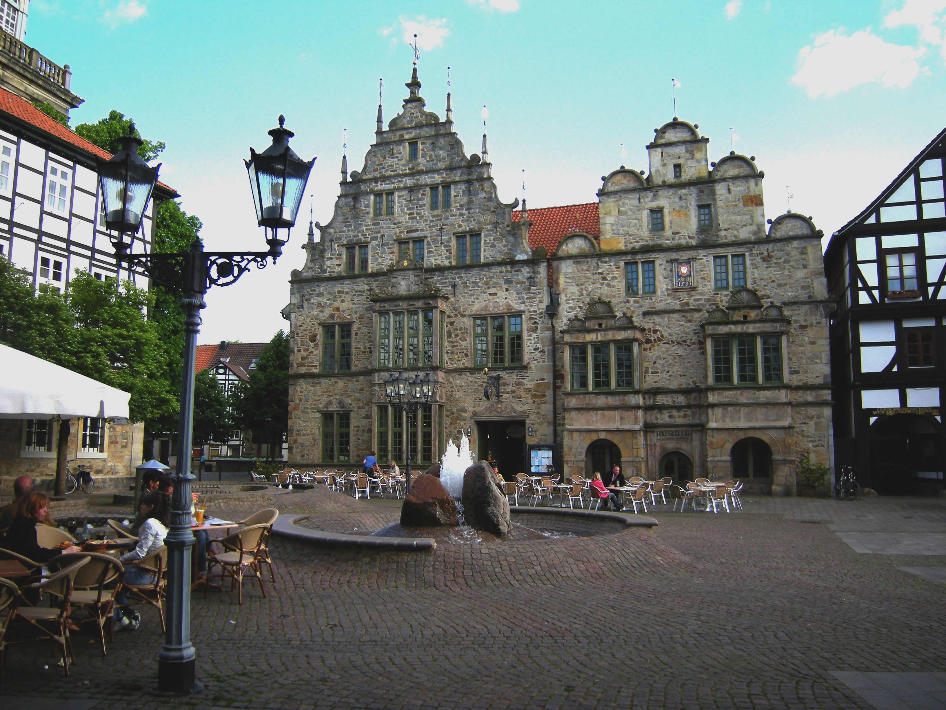 Rinteln-Rathaus.jpg